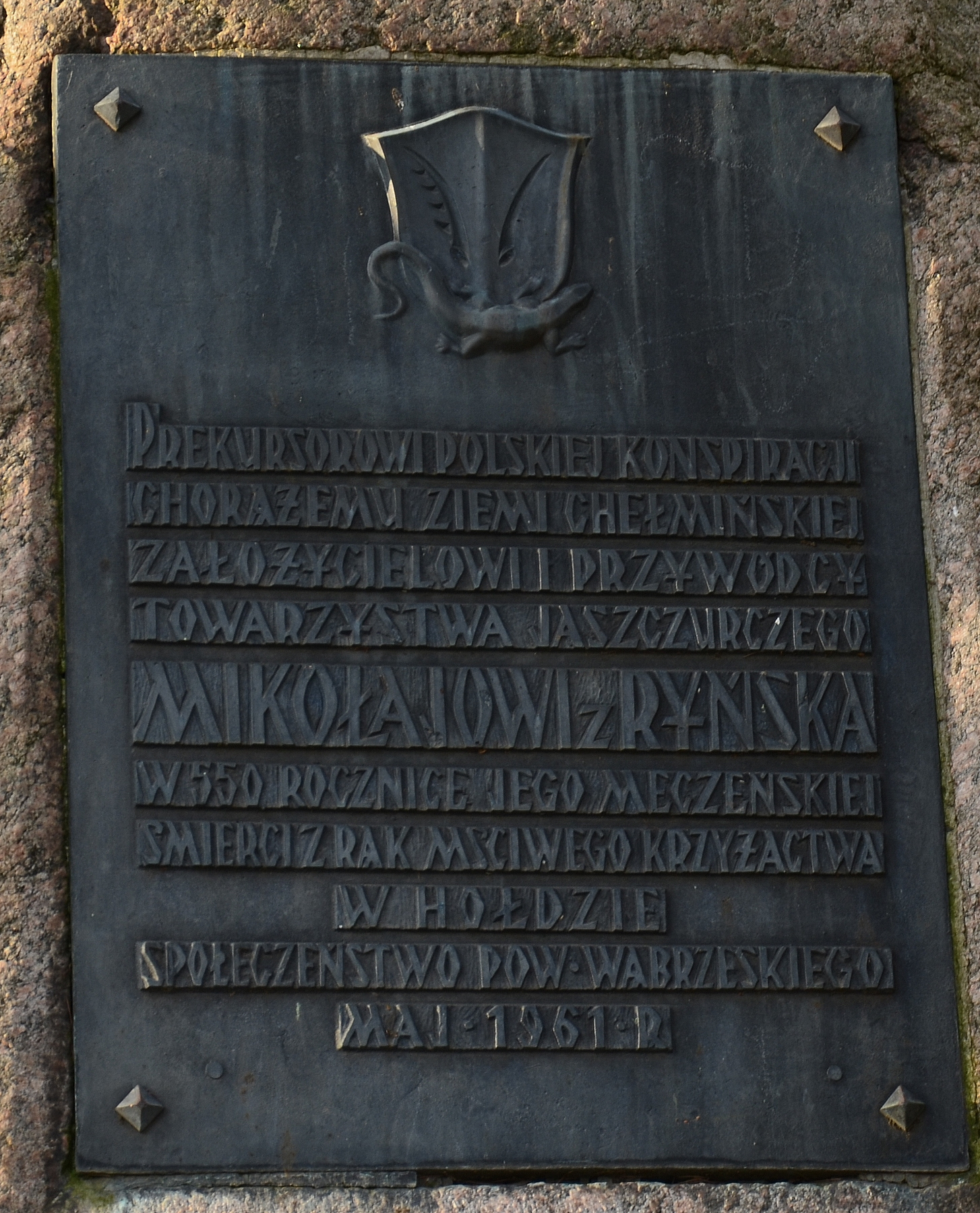 Ryńsk, tablica poświęcona Mikołajowi z Ryńska